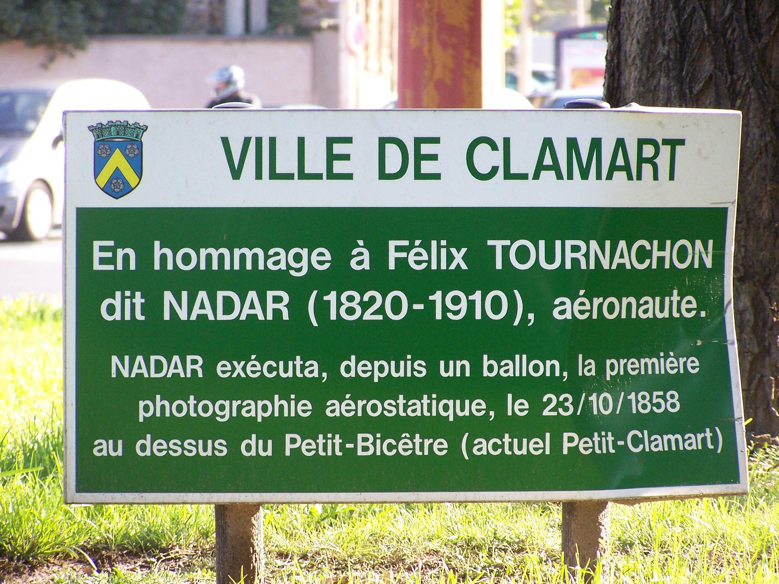 Plaque en hommage à Nadar, carrefour du Petit-Clamart, Clamart (Hauts-de-Seine, France) Tablet in homage to Nadar. Photo. perso. prise ce jour. Auteur/Author : Henry Salomé